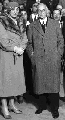 לורד רדינג ואשתו (השניה מ-1930) הליידי רדינג